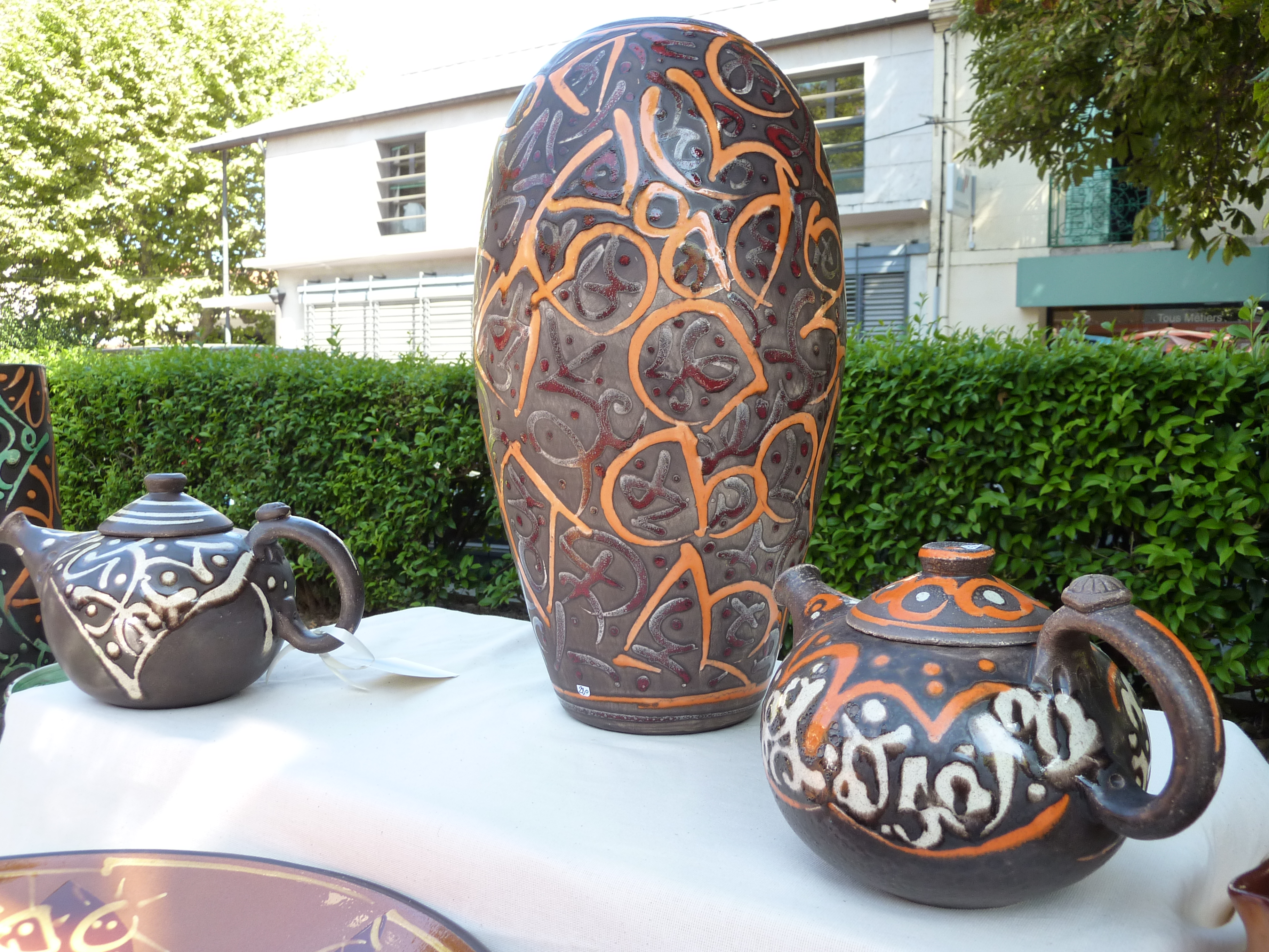 Poteries provençales modernes à Aubagne